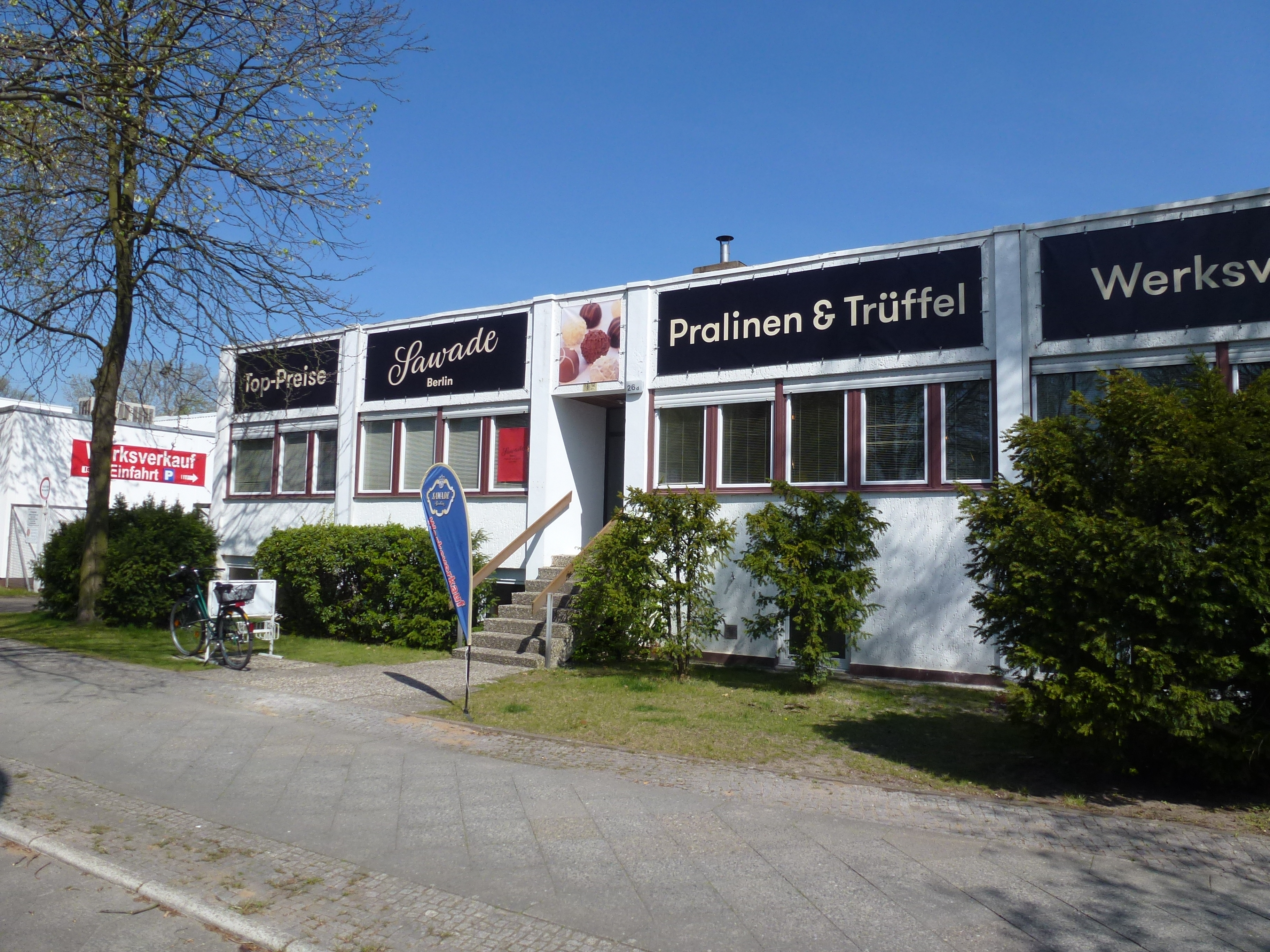 Berlin-Tegel Wittestraße Sawade